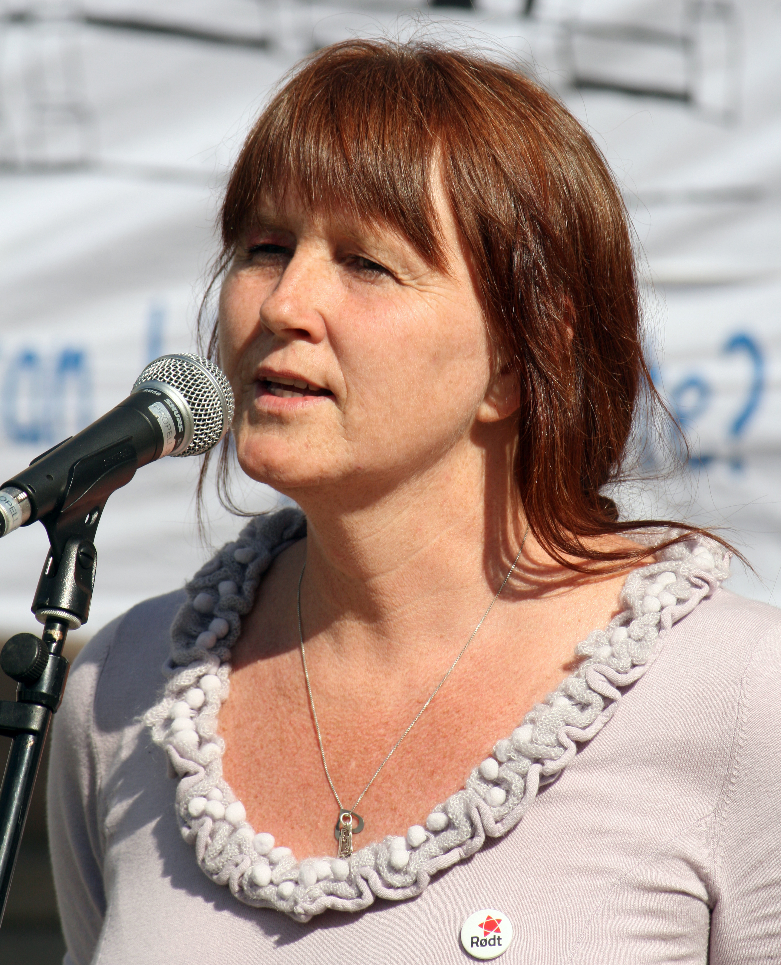 Leder i Rødt, Turid Thomassen holdt appell på slutten av Fredsmarsjen i mai 2011.